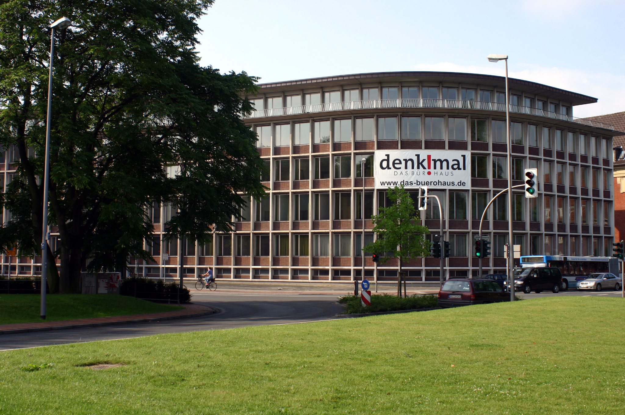 Münster, Landwirtschaftskammer, Schorlemerstraße 26